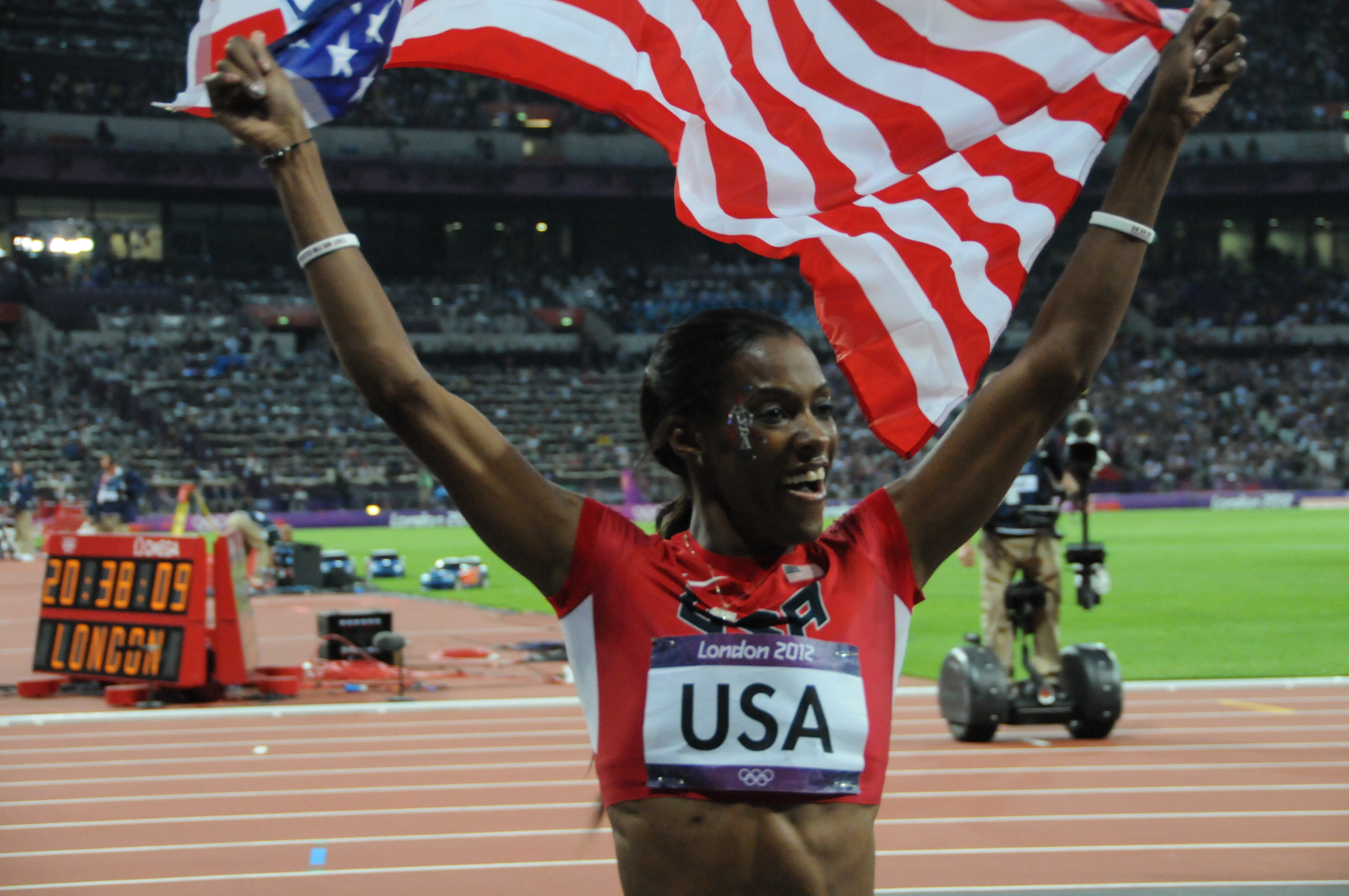 DeeDee Trotter après le succès du relais américain dans le 4x400 aux jeux olympiques de Londres 2012